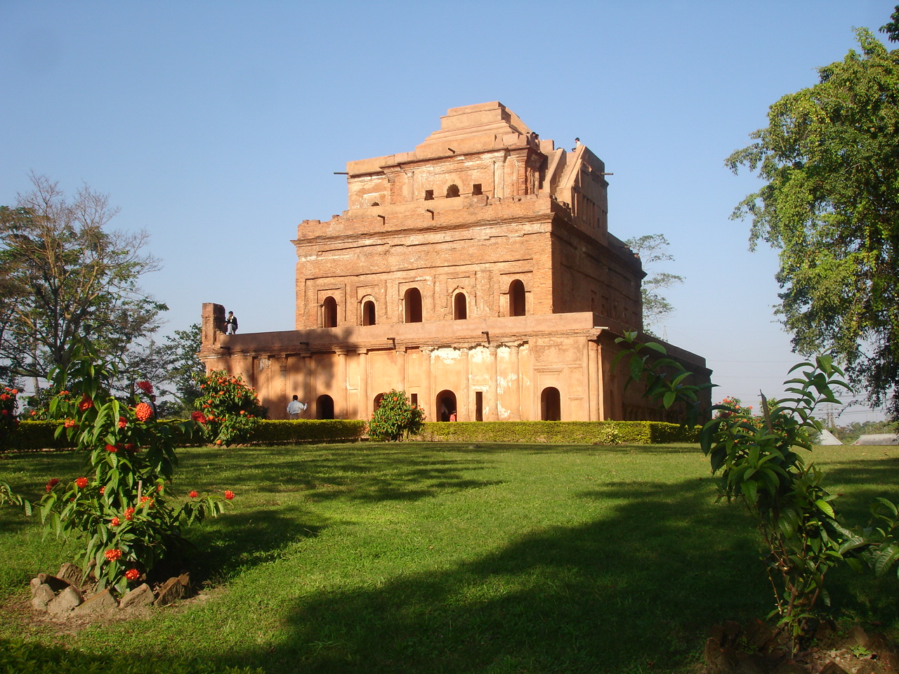 অসমীয়া: গড়গাঁৱৰ কাৰেং ঘৰৰ পাৰ্শ্বৱৰ্তী দৃশ্য